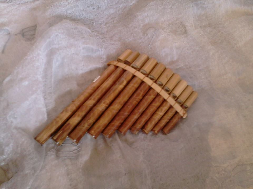 חליל פאן 10 שלבים